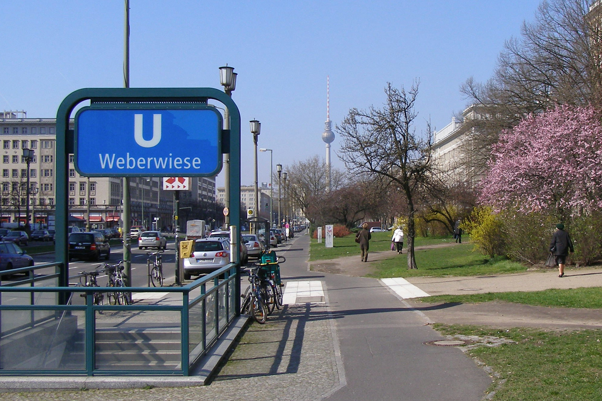 U-Bahnhof Weberwiese, Berlin (Eingang; im Hintergrund der Fernsehturm Alexanderplatz) Underground station Weberwiese, Berlin (entrance; in background the TV tower Alexanderplatz)